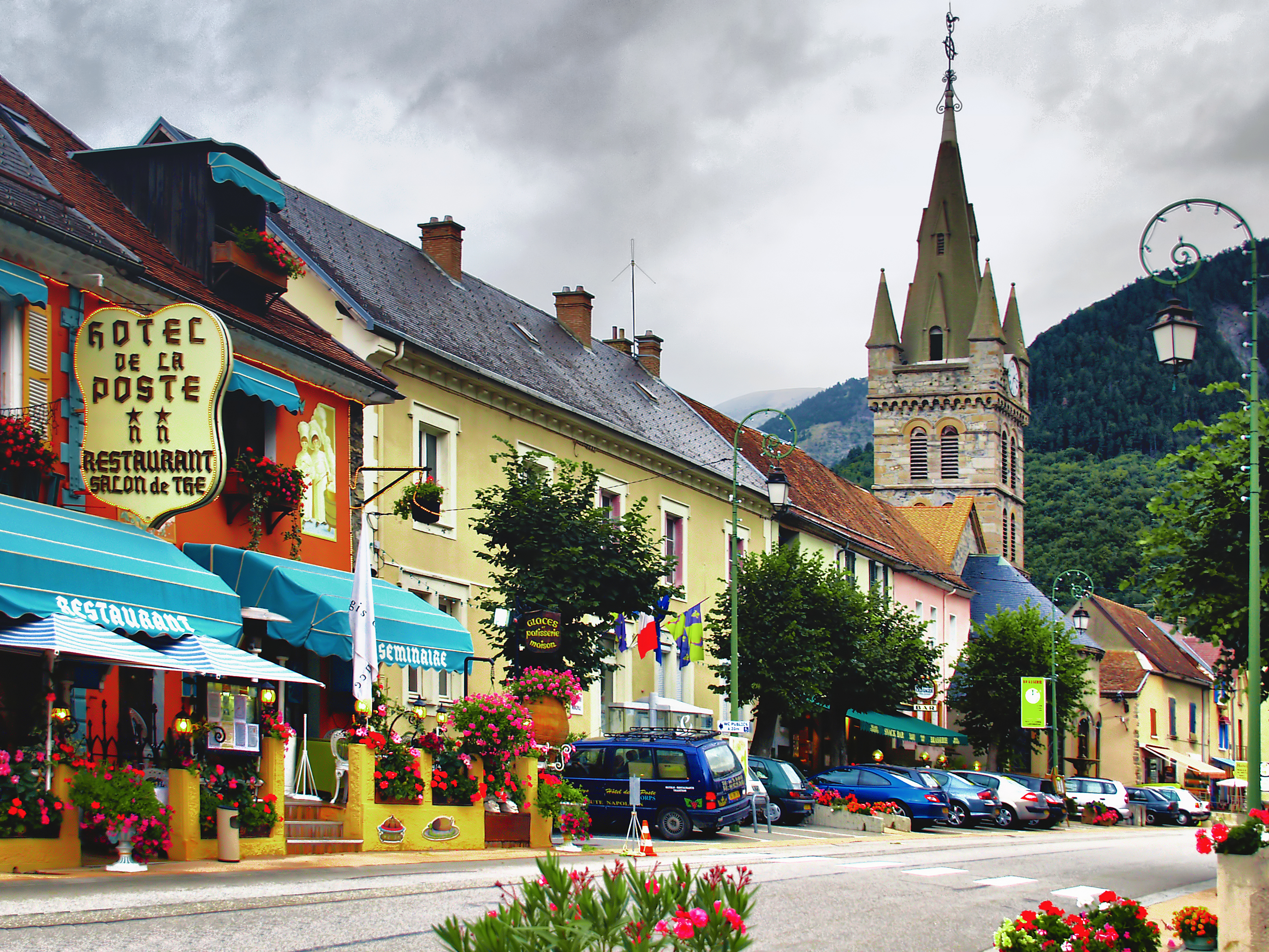 Corps - Centre ville